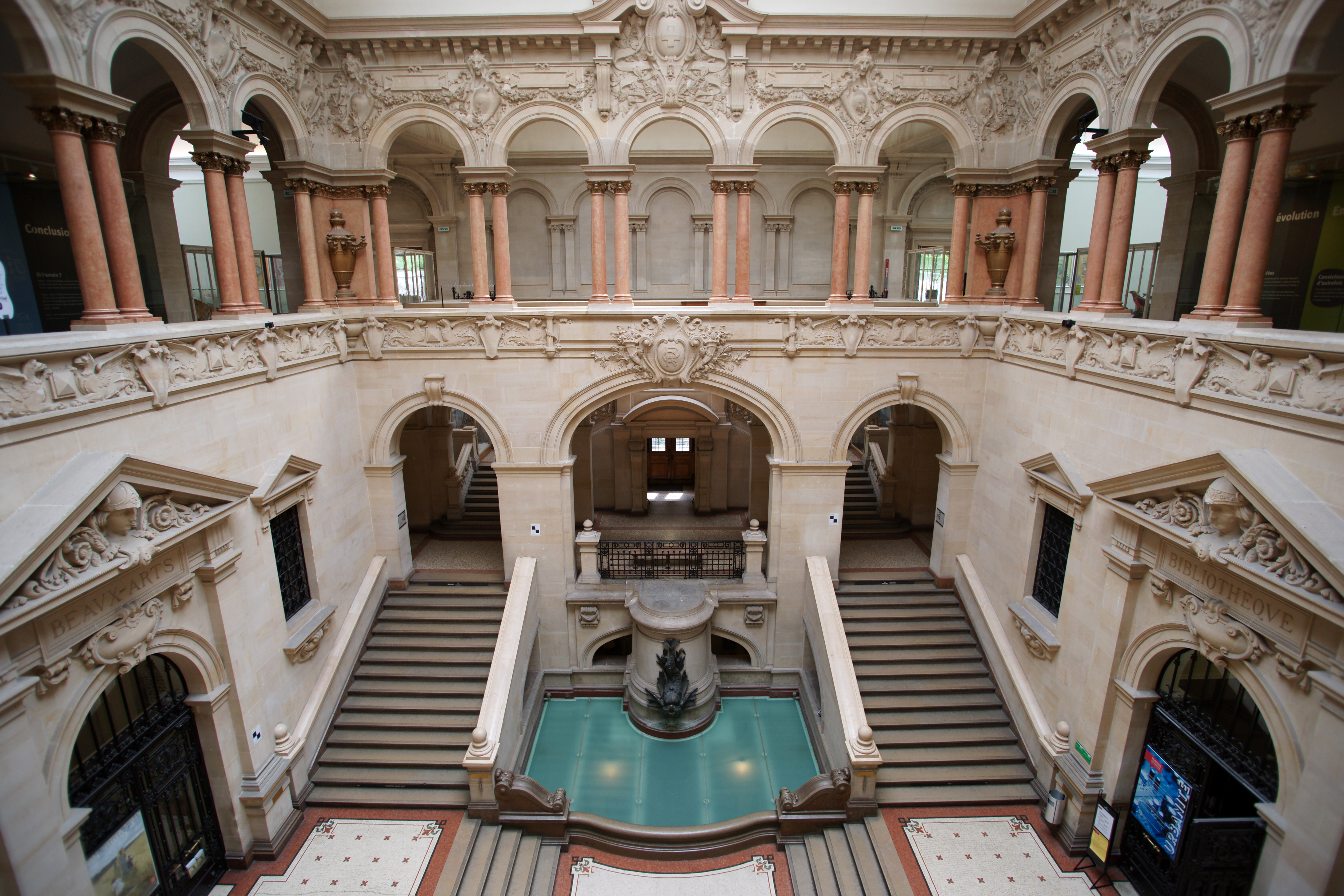 Palazzo di Rumine The making of this document was supported by Wikimedia CH. (Submit your project!) For all the files concerned, please see the category Supported by Wikimedia CH.